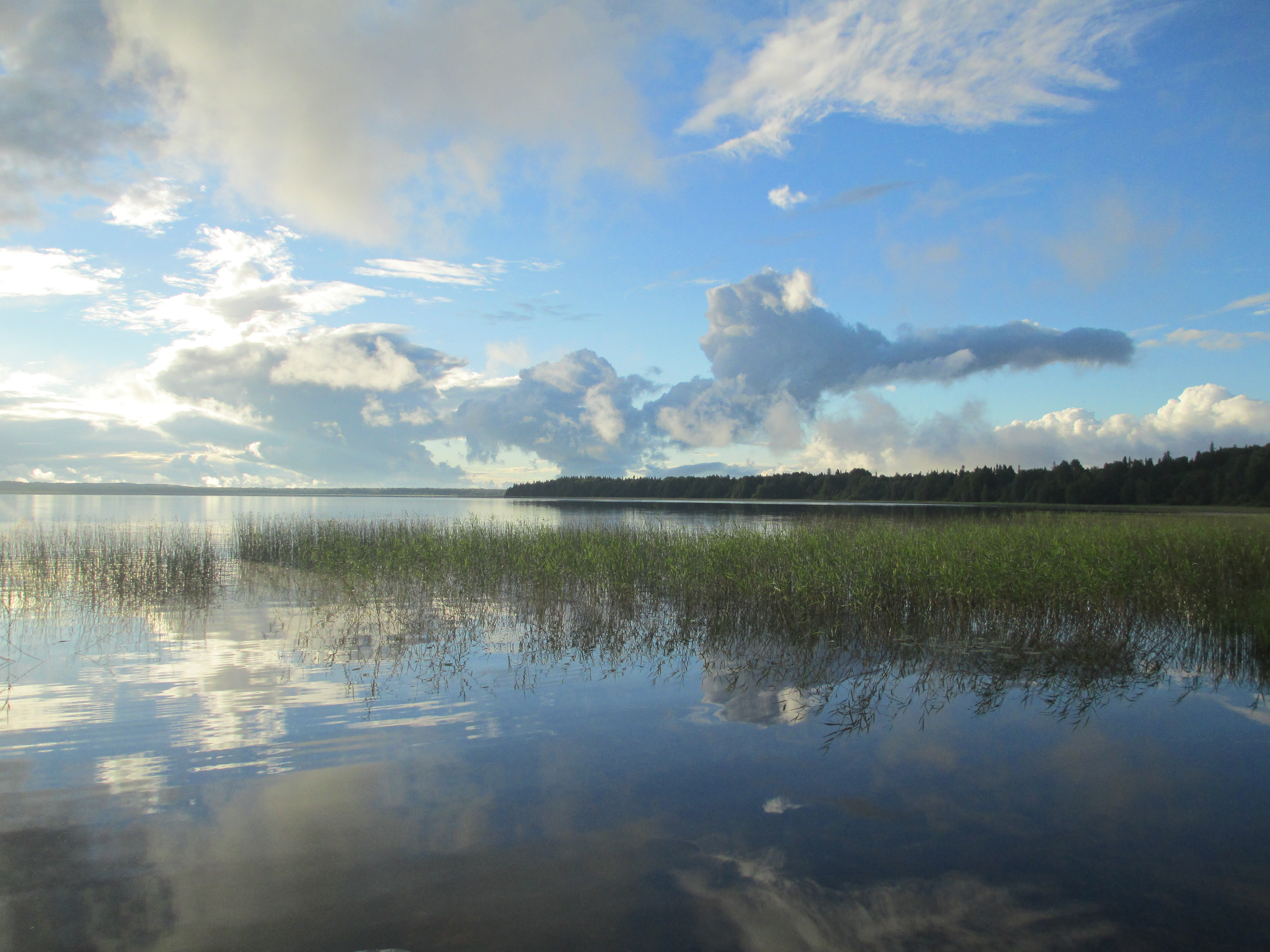 Пейзаж на Вагатозере, вид с мыса. Республика Карелия.